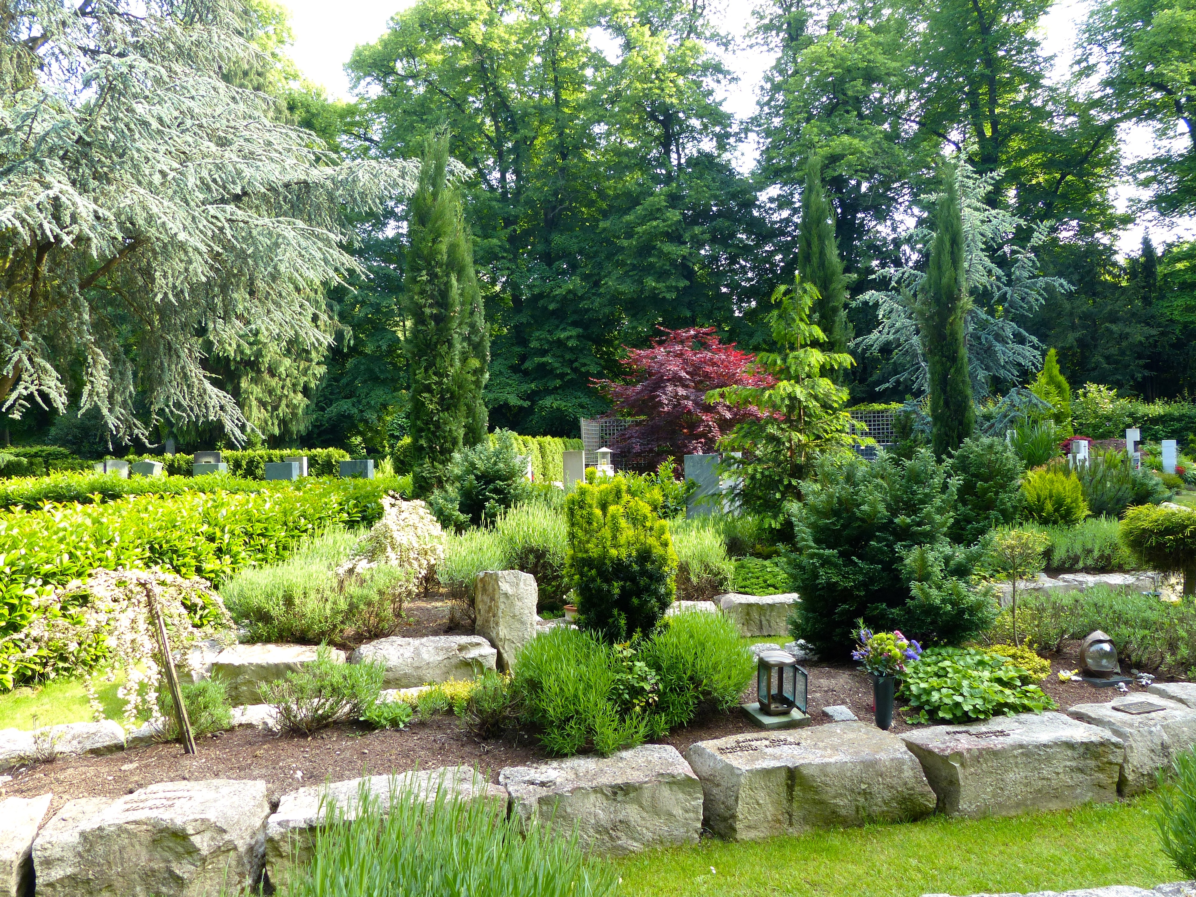 LSG Melatenfriedhof: Neu angelegte Bestattungsgärten